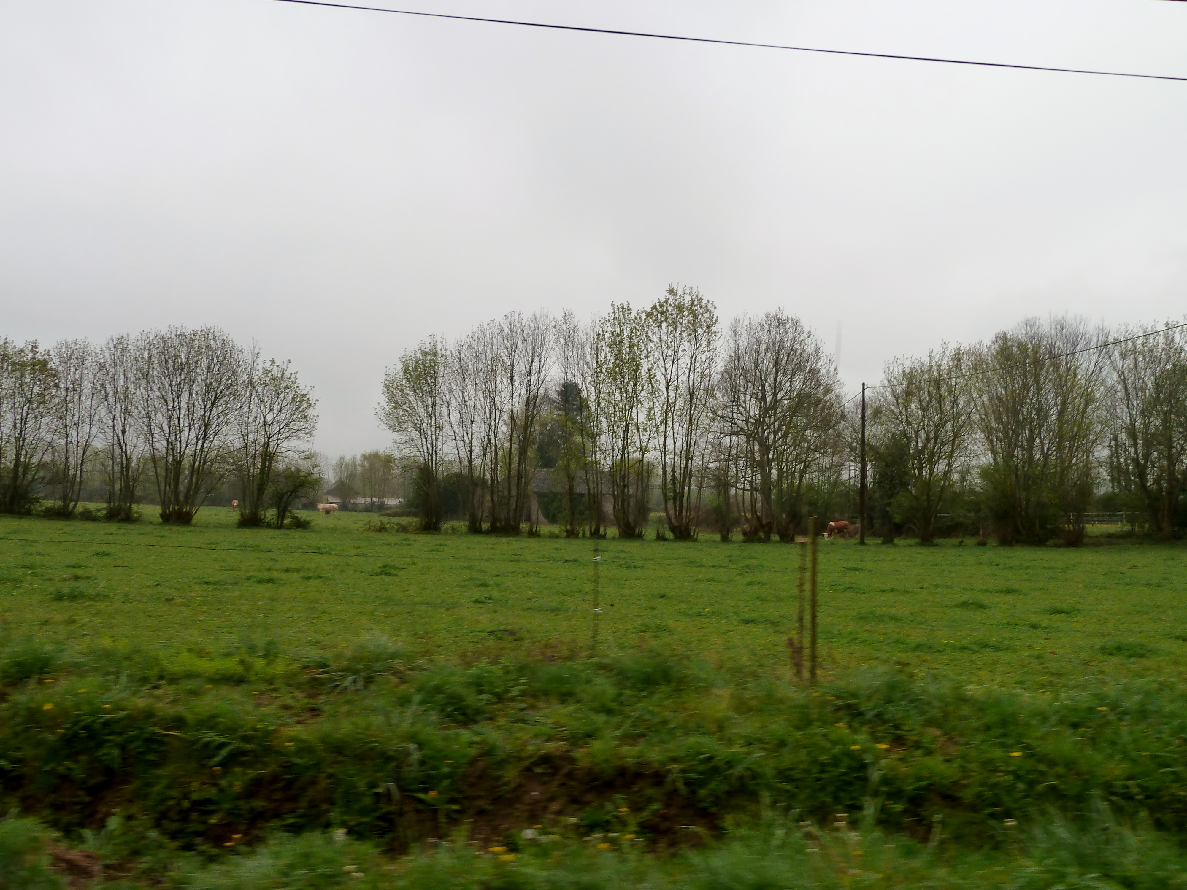 Gardères